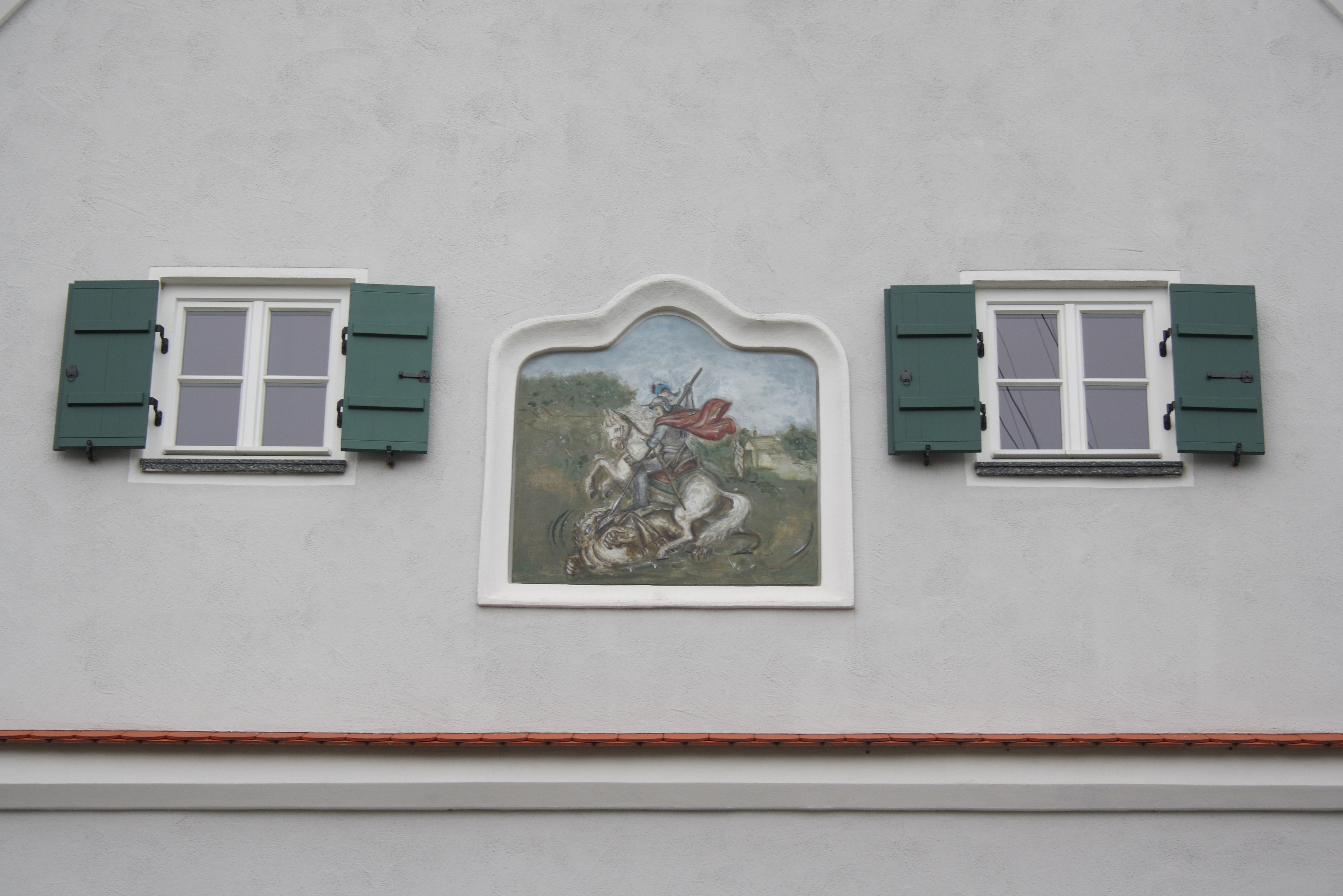 ehemaliges Gasthaus zur Krone in Weisingen, einem Ortsteil von Holzheim im Landkreis Dillingen an der Donau, bez. 1737